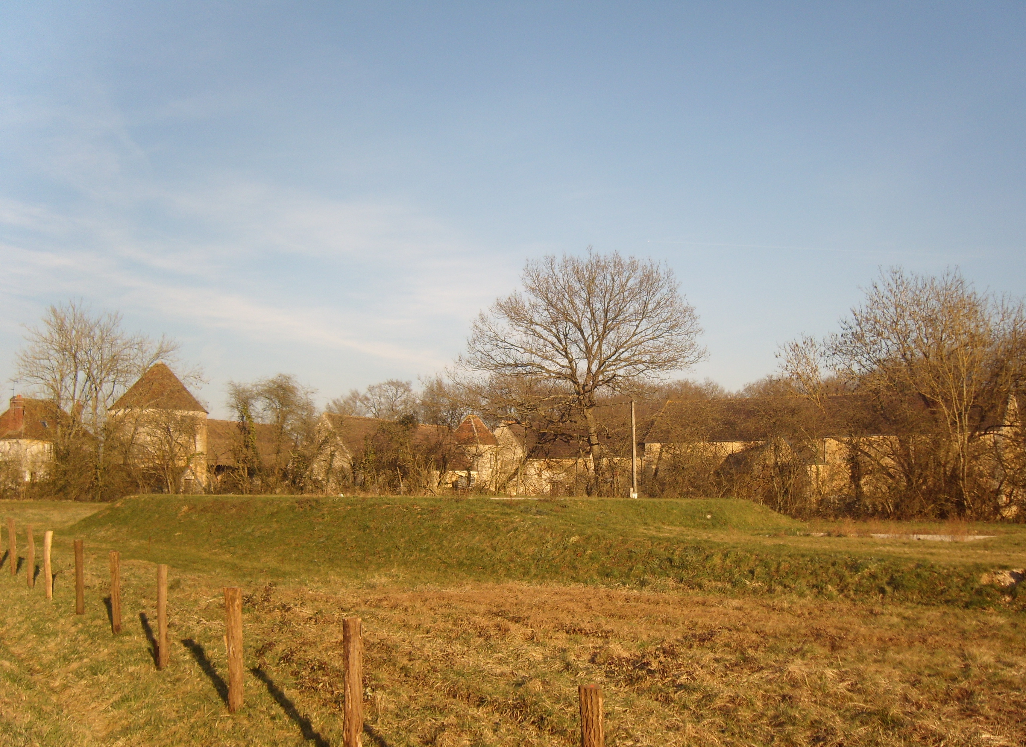 La ferme de Malassise à Fontenay-Trésigny